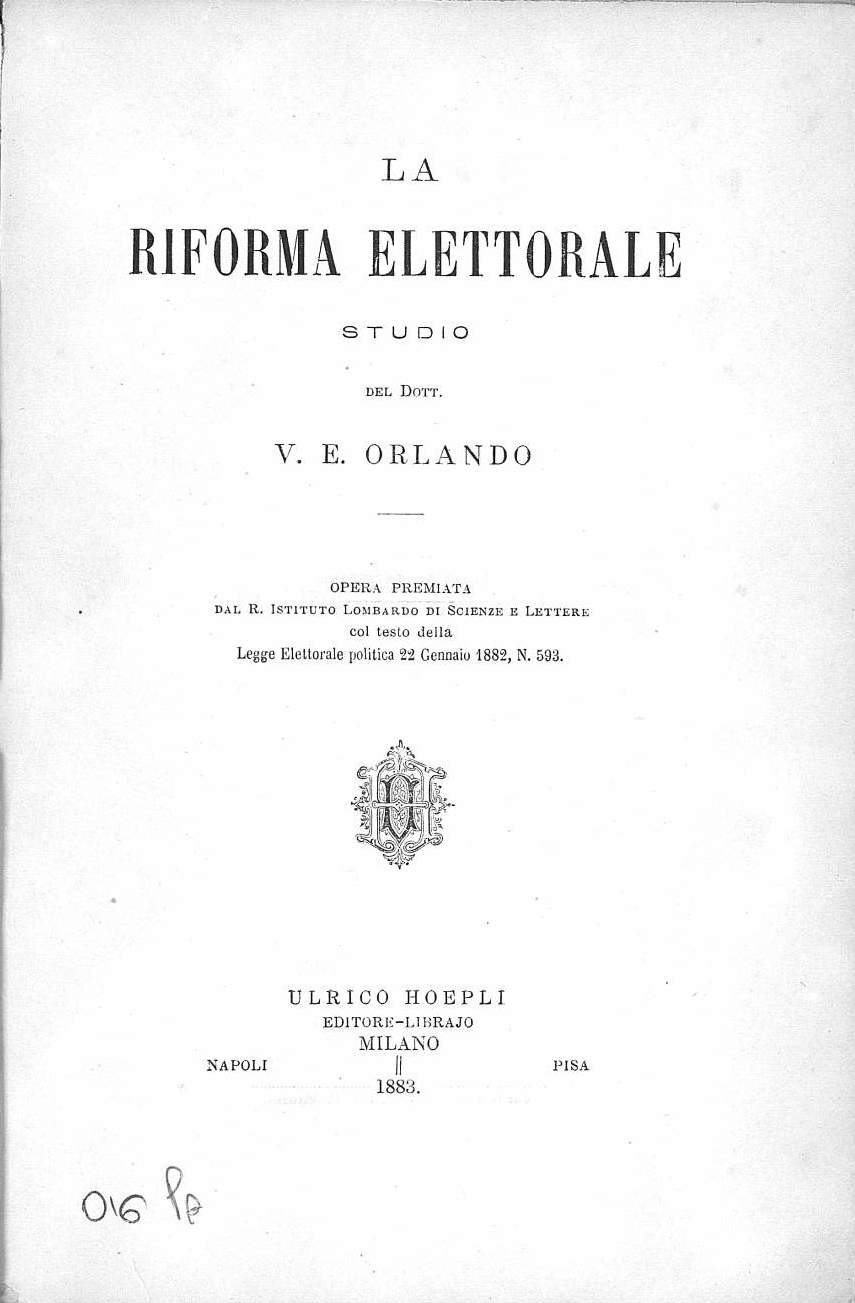 Frontespizio